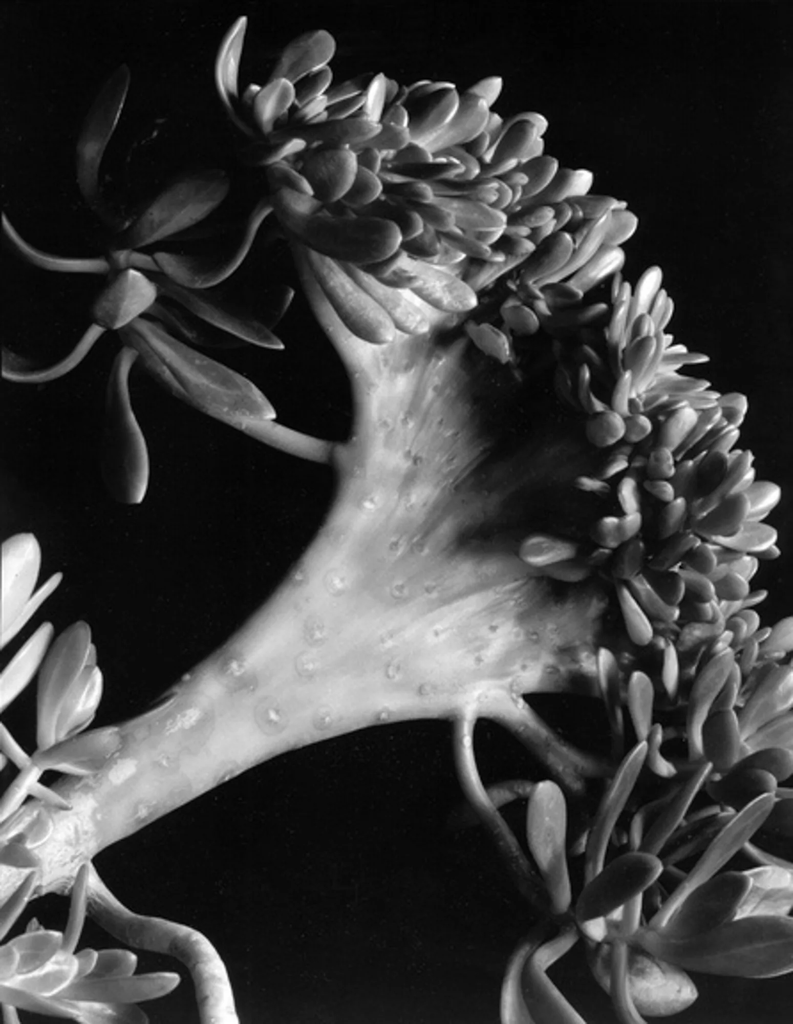 Succulent